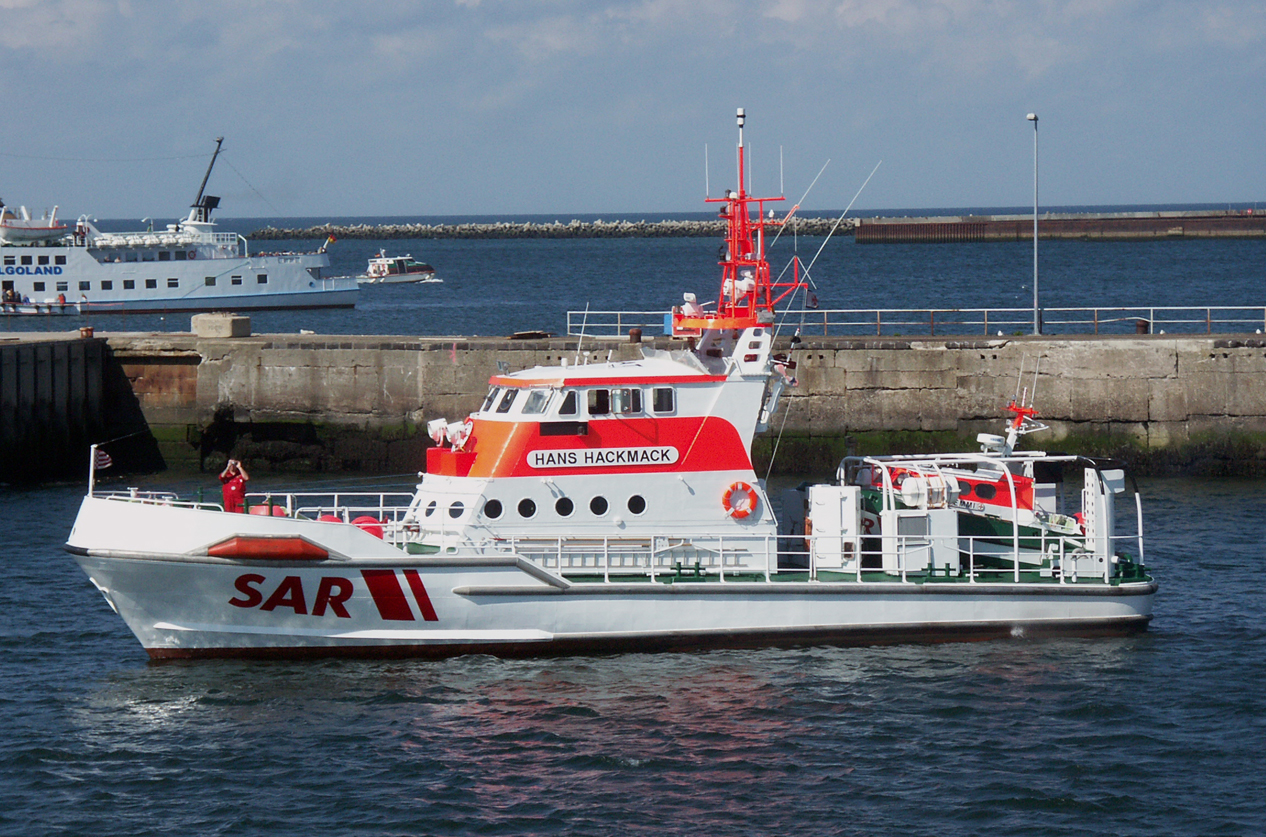 SK Hans Hackmack im Mai 2007 im Hafen von Helgoland